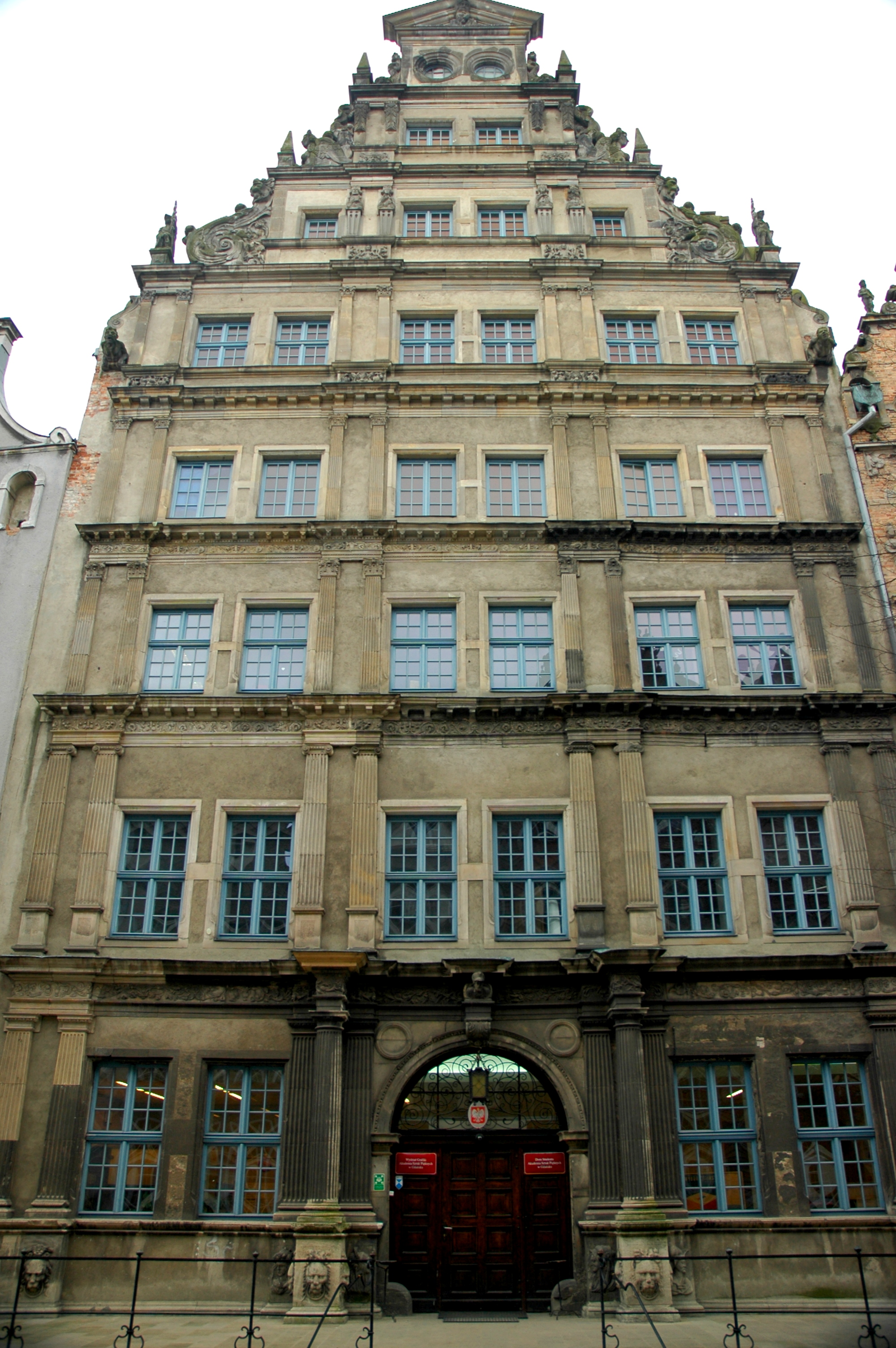 Gdańsk - ulica Chlebnicka 16, Dom Angielski